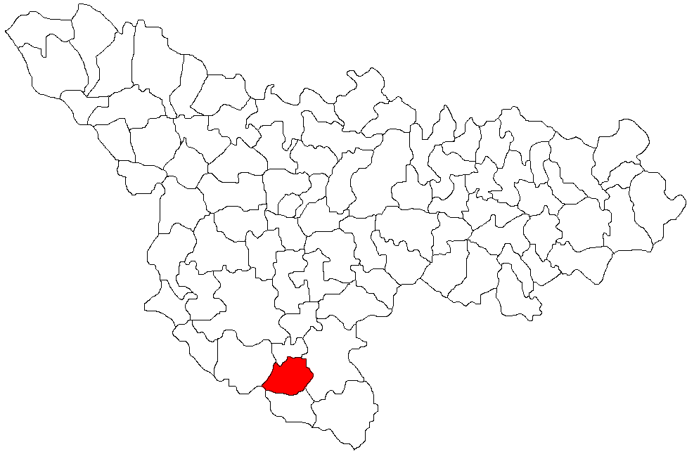 Denta, Timis Licensing Categorie:Hărţi ale judeţului Timiş